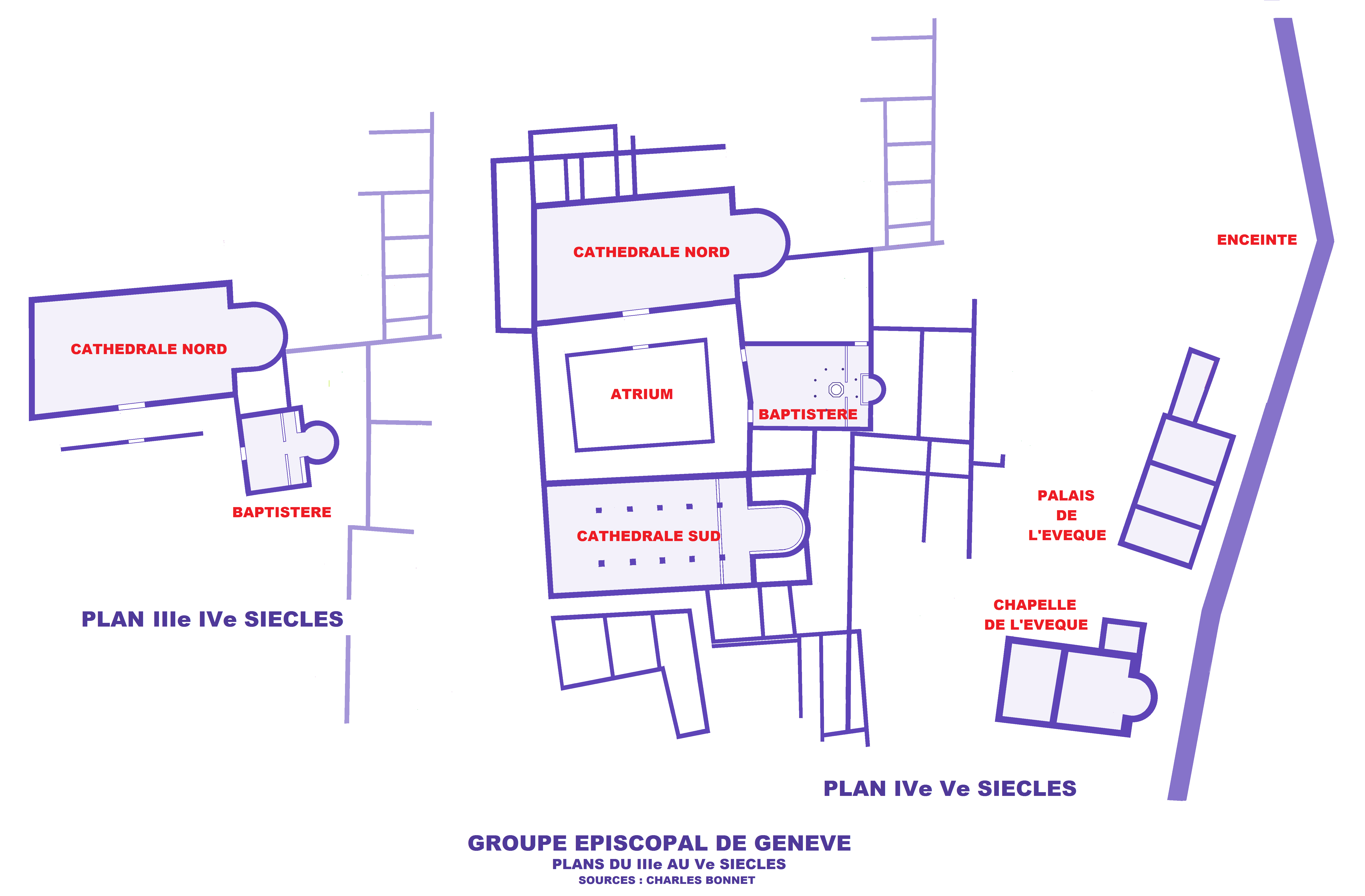 Genève, Groupe cathédral, Plans aux IIIe et Ve siècles